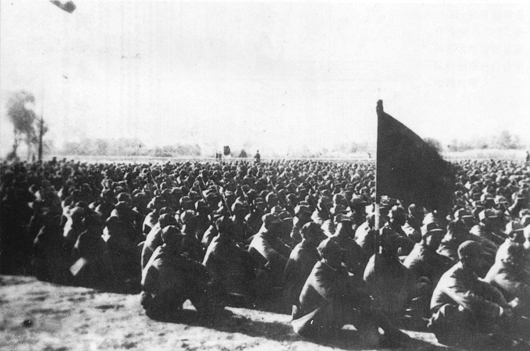 中文（中国大陆）: 1945年8月，新四军第3师大反攻前召开誓师大会